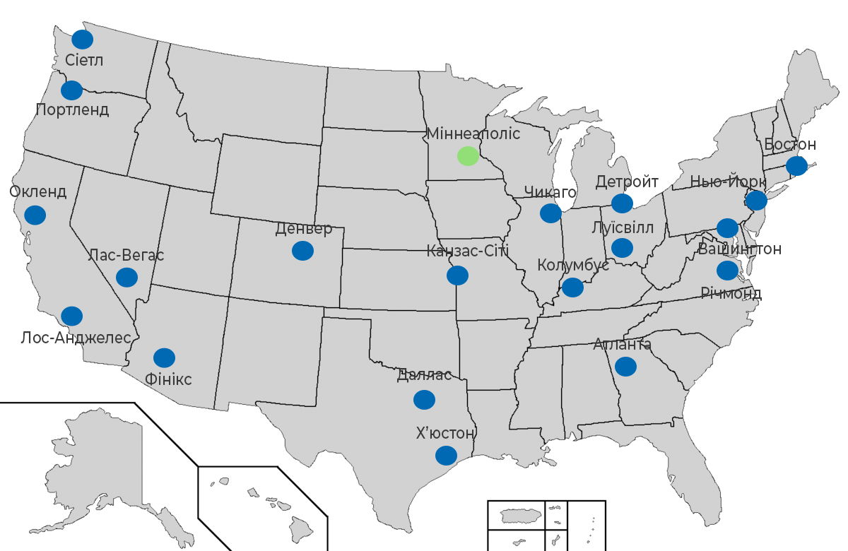 Міста США в яких проходять протести (в яких бере участь 100+ осіб) після вбивства афроамериканця Джорджа Флойда (30 травня)